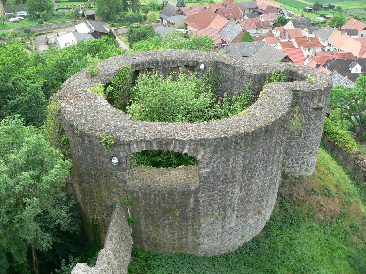 Batterieturm zum Vorwerk der Burg Münzenberg in Hessen, Germany